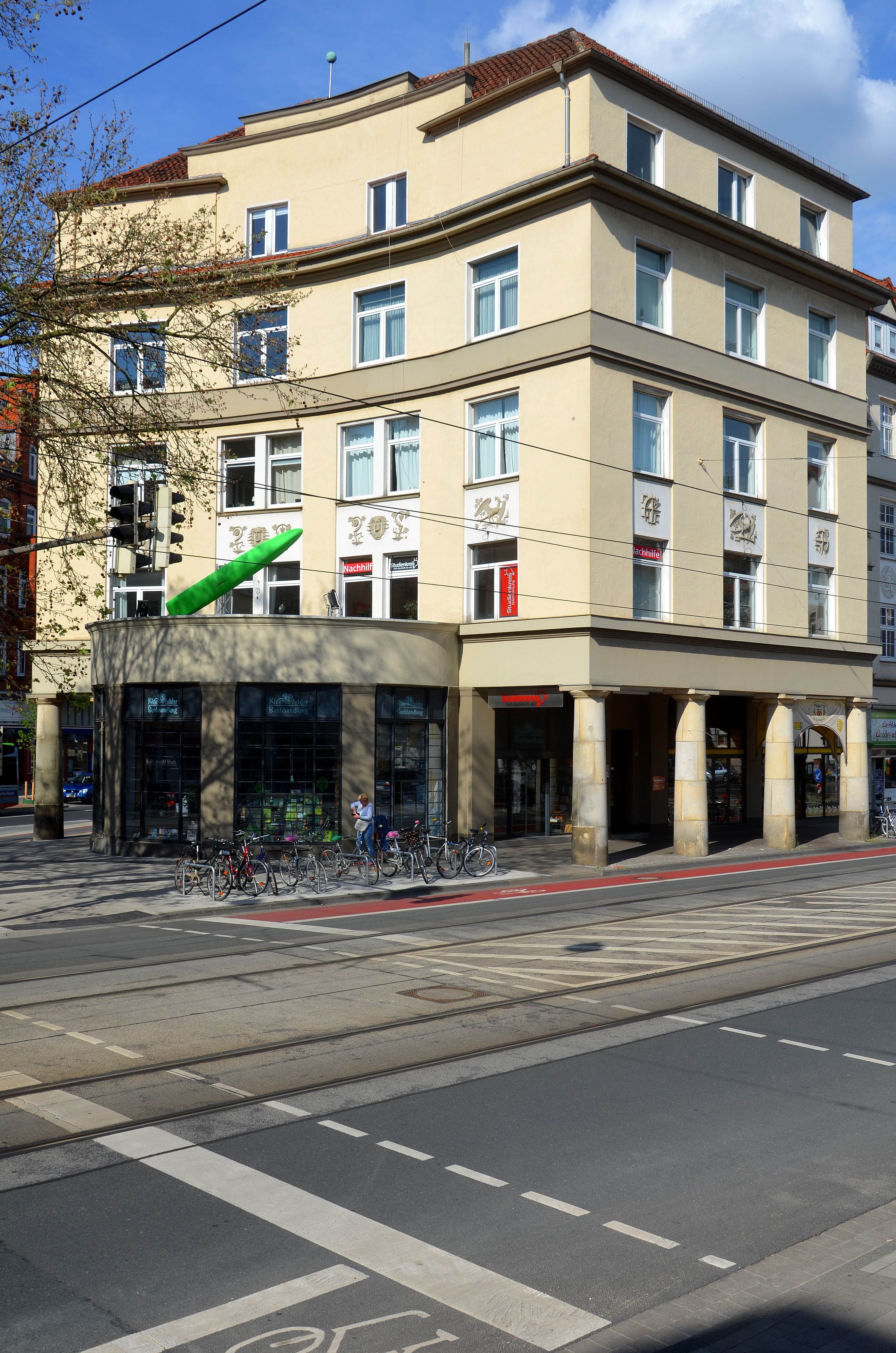 Installation des Lichtbildhauers Frantz Betz, ein in leuchtend-grün gefärbtes Surfboard zum Thema Kleefeld leuchtet, installiert über den Geschäftsräumen der Kleefelder Buchhandlung an dem von dem Architekten Heinrich Möll 1925 errichteten denkmalgeschützten Gebäudekomplex Kirchröder Straße 106–107 und Scheidestraße 12 in Hannover-Kleefeld.